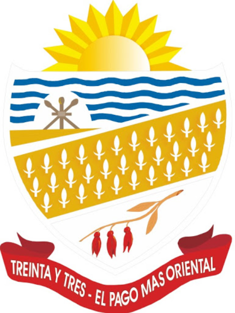 El escudo del Departamento de Treinta y Tres, fue creado por el Dr. José Gorosito Tanco. Se simbolizan el sol de nuestra Bandera Nacional, el Río Olimar, las lanzas de los 33 Orientales, un túmulo sobre las ondas del río que es una tumba indígena con las armas cruzadas, y la flor del Ceibo, nuestra flor nacional.